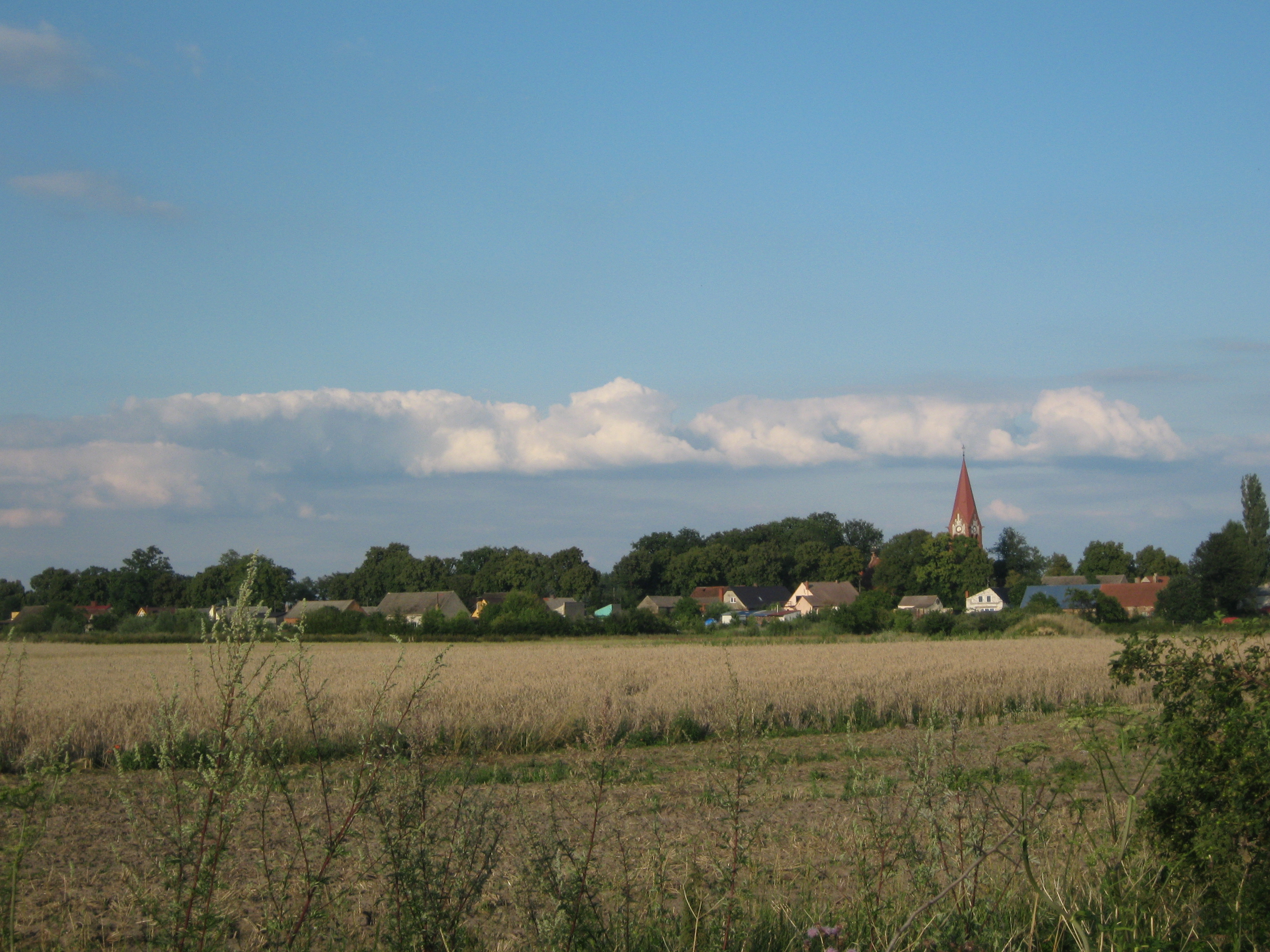 Widok Stawu z pobliskich pól